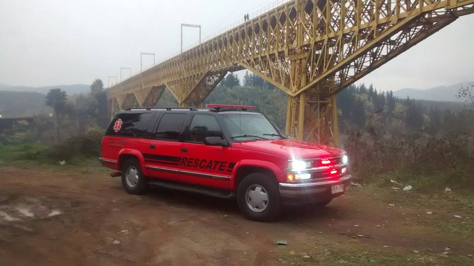 Unidad R-2 en servicio en Collipulli